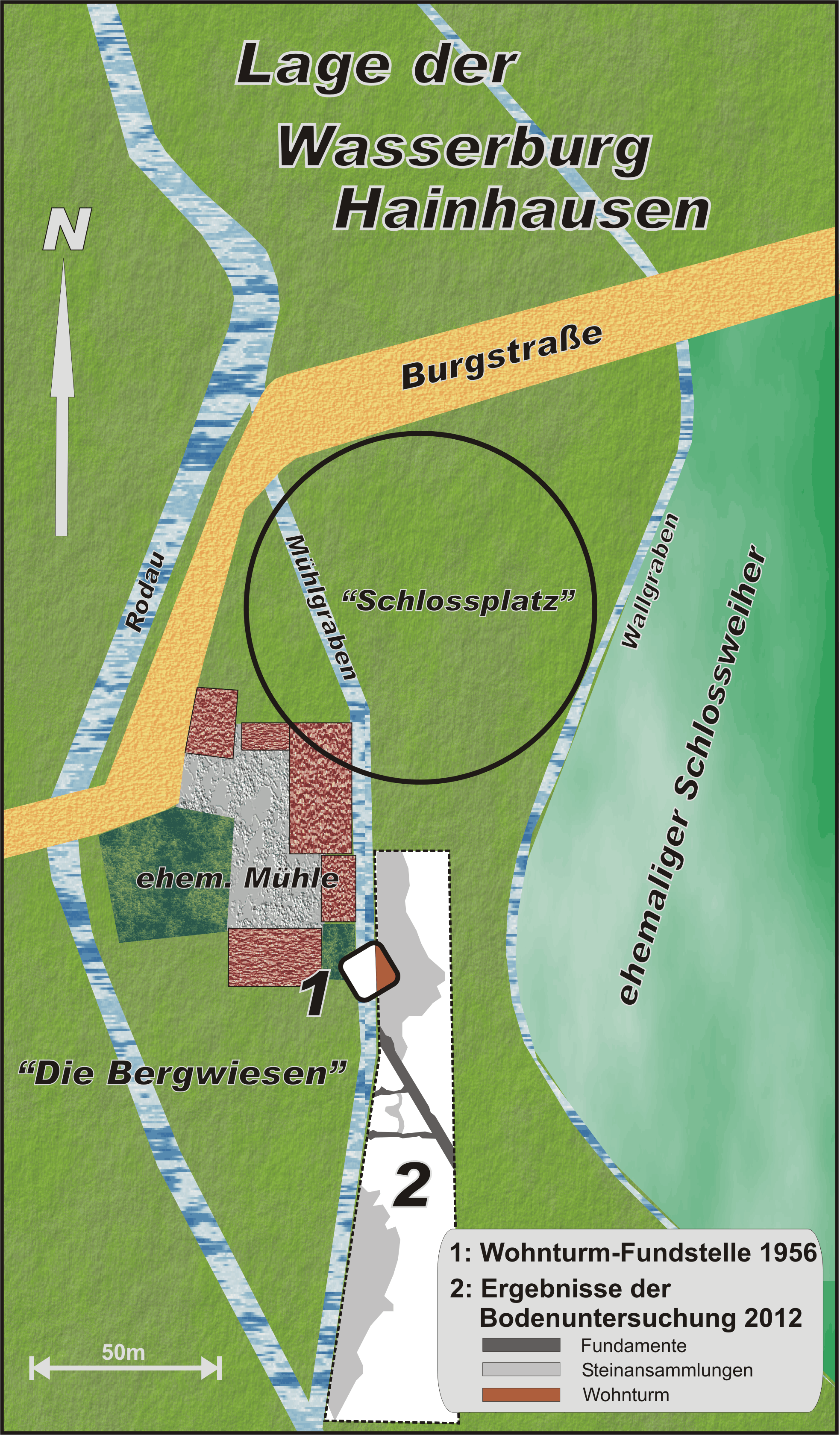 Lageplan der Wasserburg Hainhausen, Bodendenkmal in Rodgau, Hessen, Deutschland - nach einer Skizze von Kottek 1956